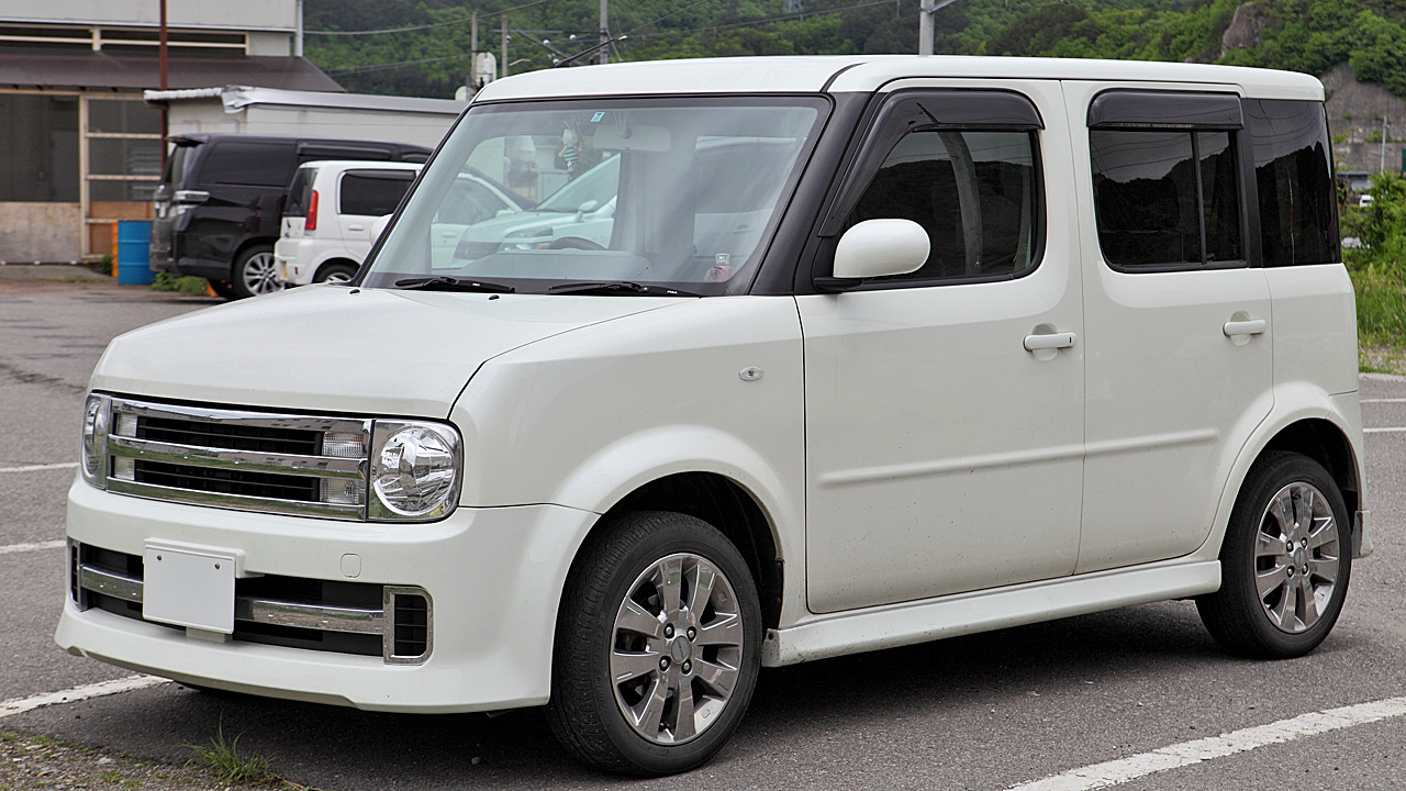 Nissan Cube Rider ( Z11 )